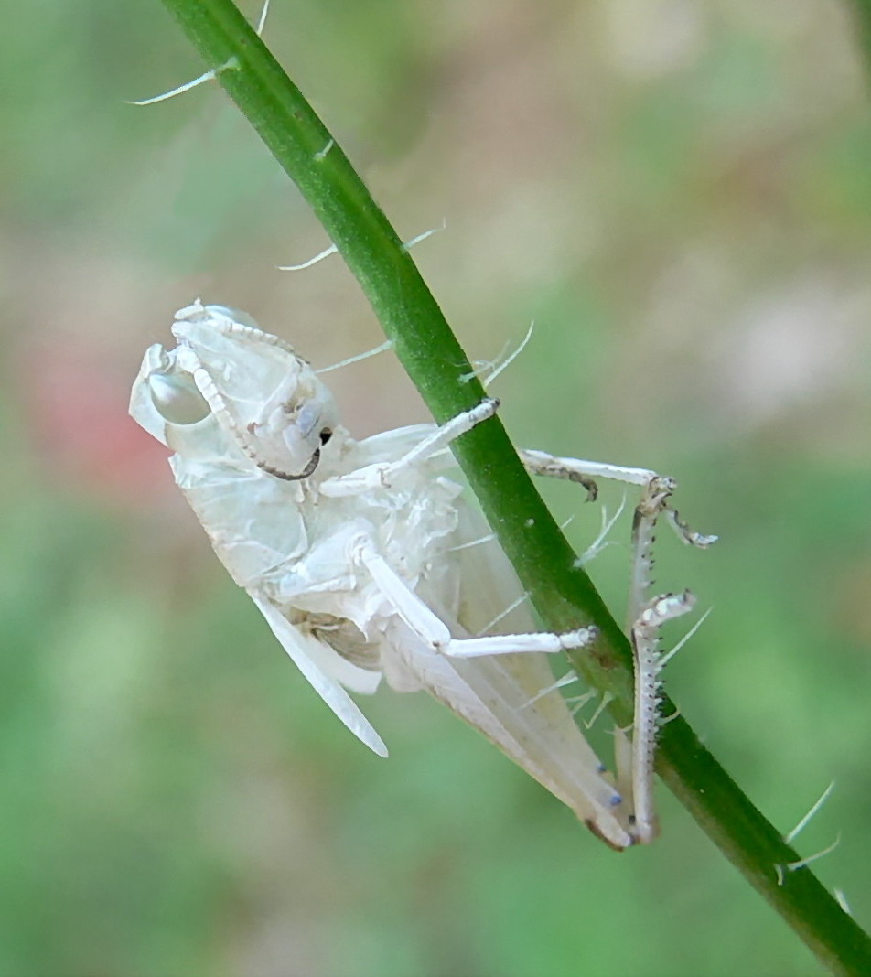 Exuvie de criquet accrochée à son support / Grasshopper's exuvia, France, 2006. Auteurs Jodelet/Lépinay